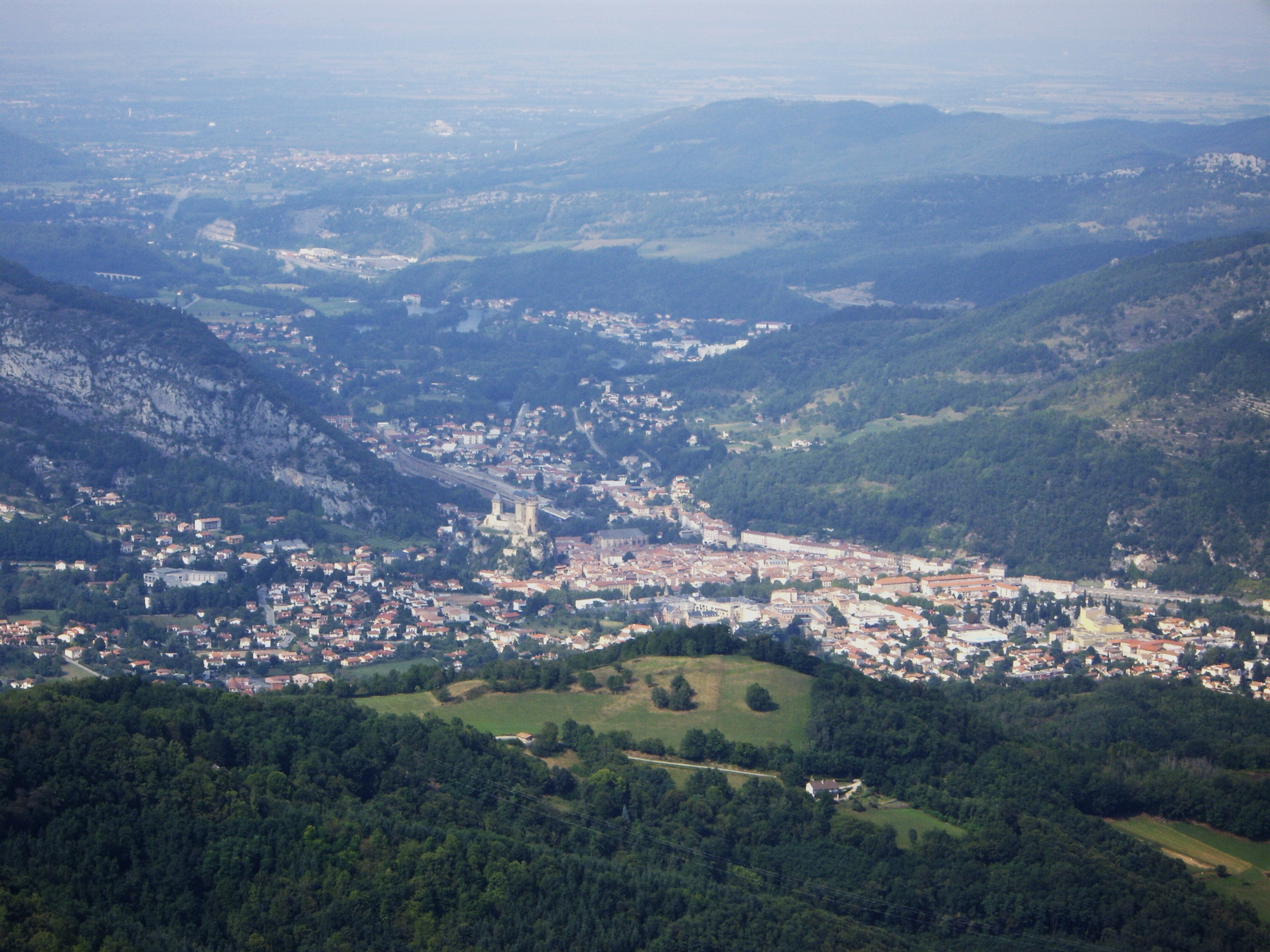 Foix (09)